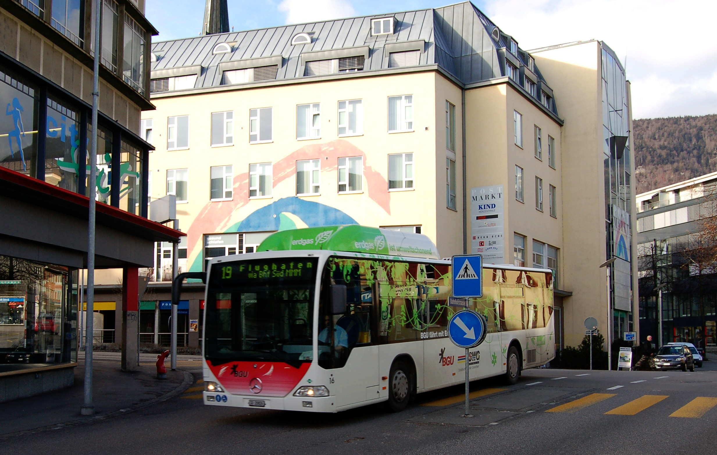 Erdgas Bus der BGU Grenchen in der Innenstadt